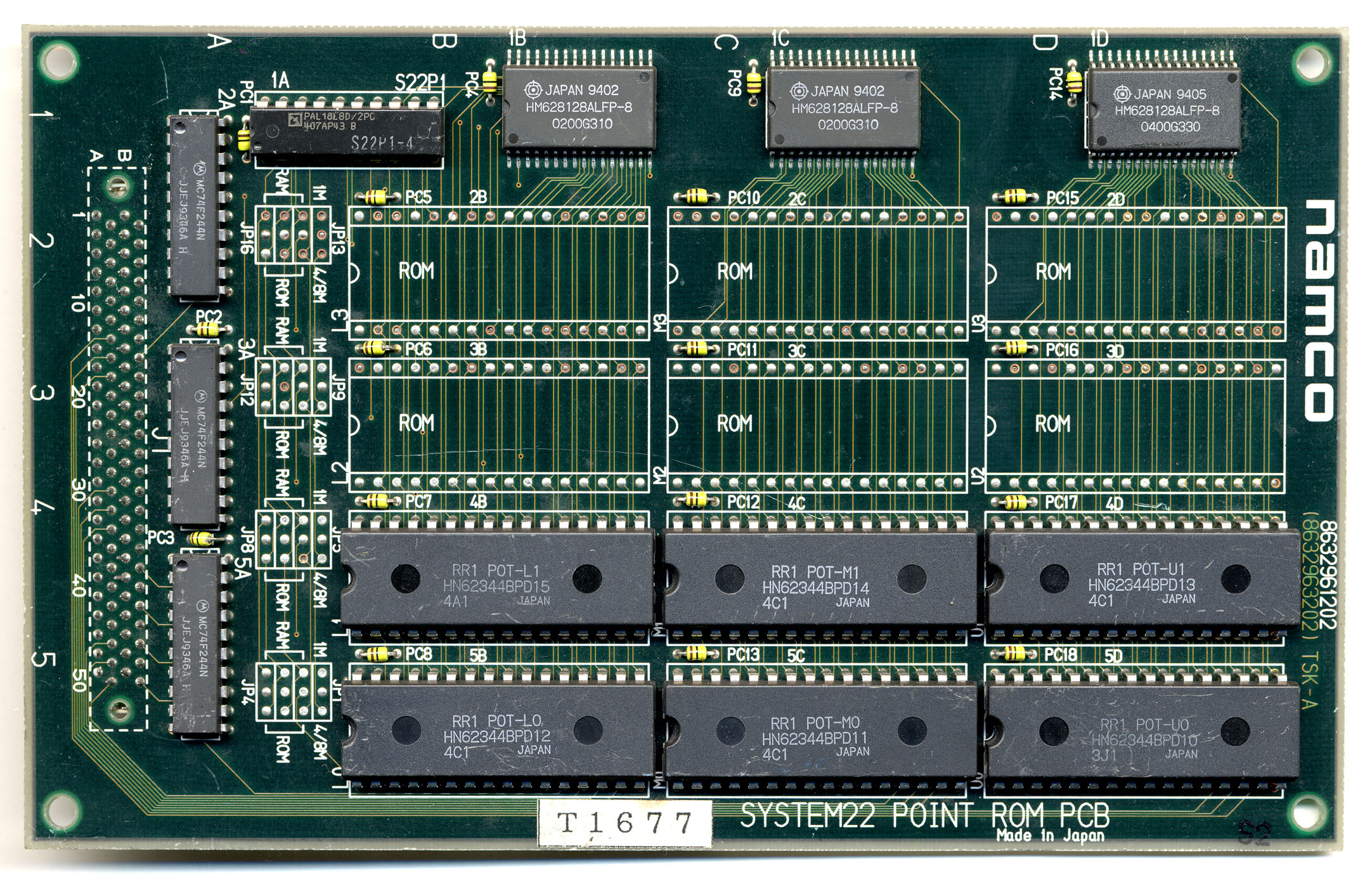 NAMCO SYSTEM22 POINT ROM PCB SILK:8632961202 PATTERN:(8632963202)